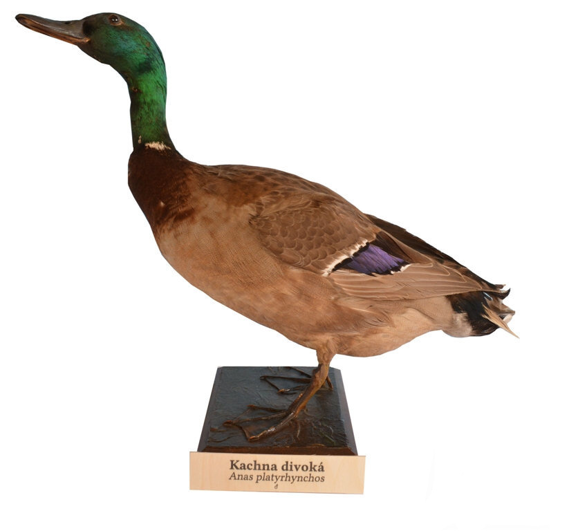 Dermoplastický preparát ze sbírek Lovecko-lesnického muzea v Úsově